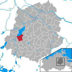 Kummerow, Landkreis Demmin, Mecklenburg-Vorpommern